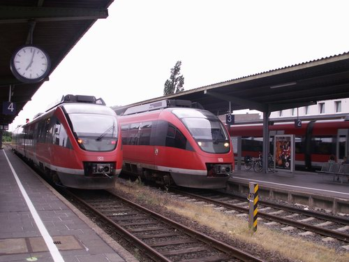 Bombardier Talent BR 644 im Bahnhof Euskirchen am Bahnsteig 4